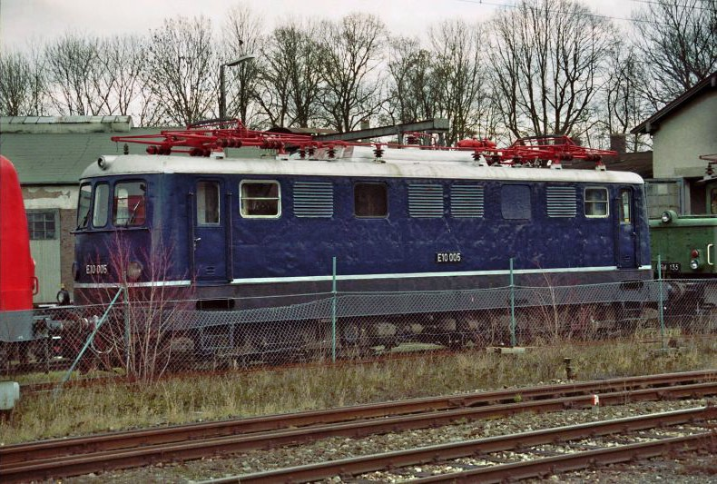 E 10 005 (built in 1953) am 08.12.07 in Nördlingen (bis 14.06.2016 in Nördlingen)